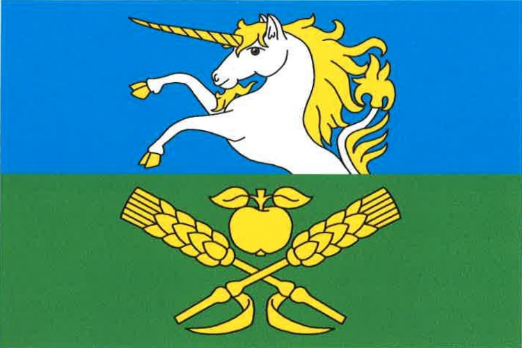 vlajka, Horní Beřkovice, okres Litoměřice